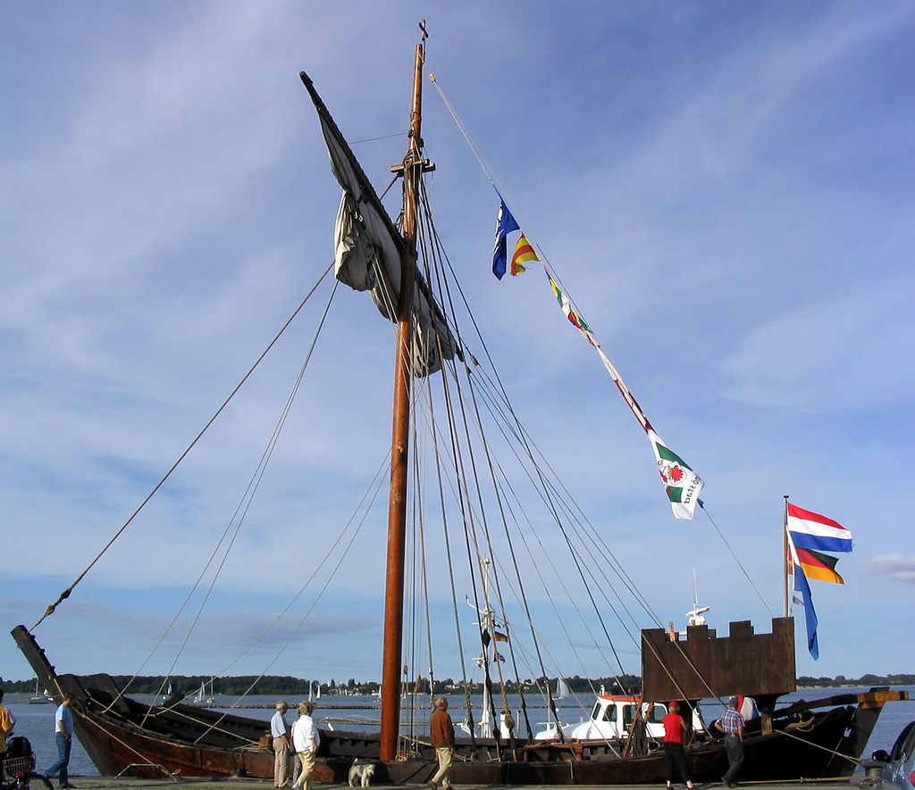 Beschreibung: Kogge Kampen zu Besuch in Stralsund / Cod Kampen visits Stralsund Fotograf: Darkone, 7. Juli 2004